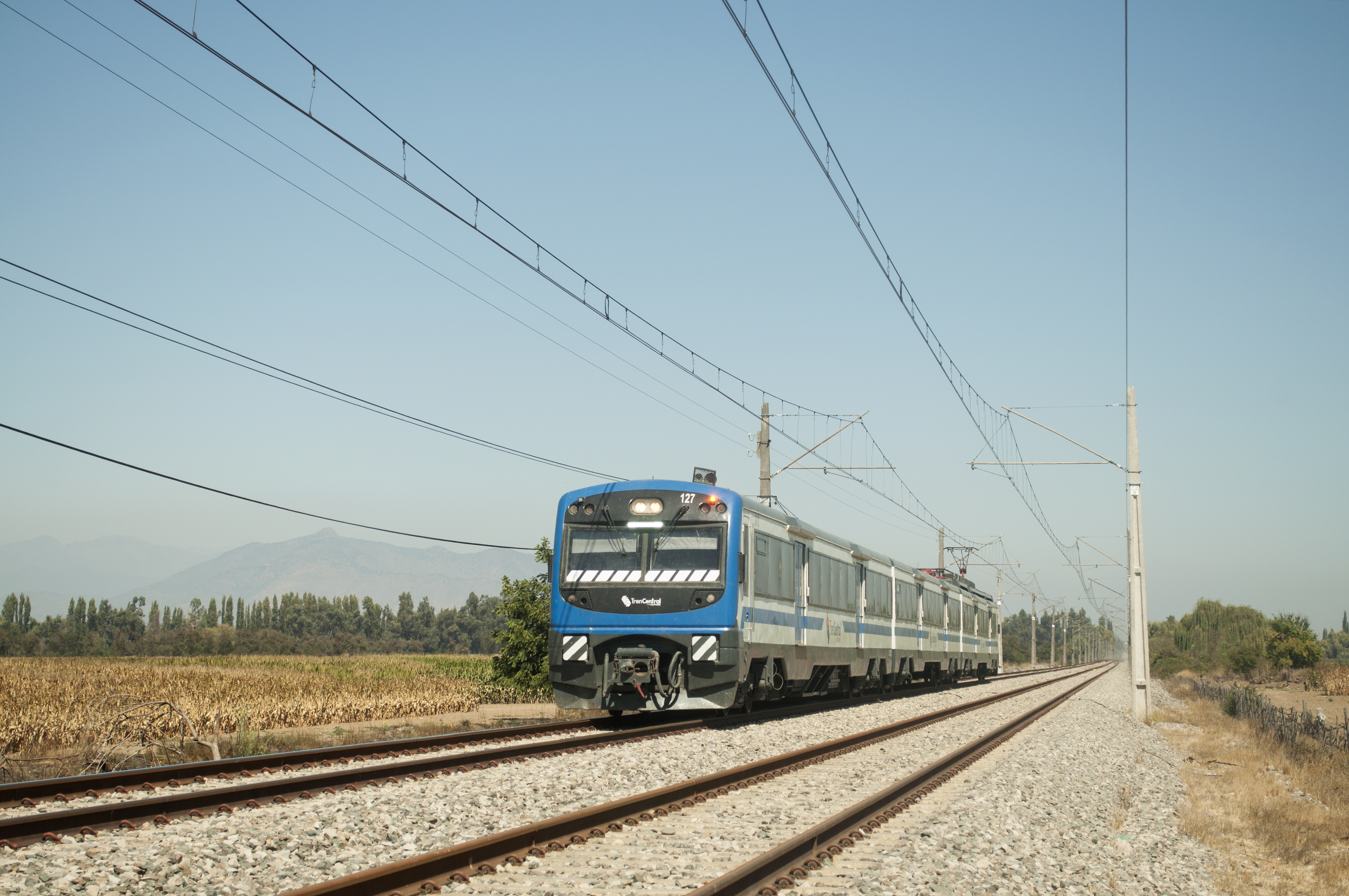 Otra mas del reluciente 127 corriendo como Metrotren Rancagua.